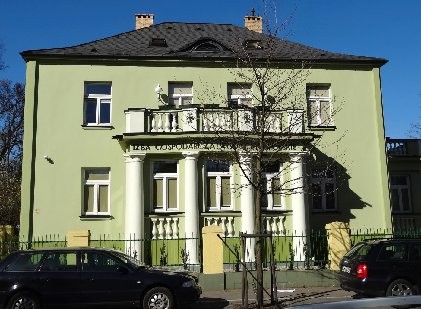 Willa ul. Kasprowicza 2 róg ul. Markwarta w Bydgoszczy (1927-1929, siedziba Izby Gospodarczej Wodociągi Polskie)